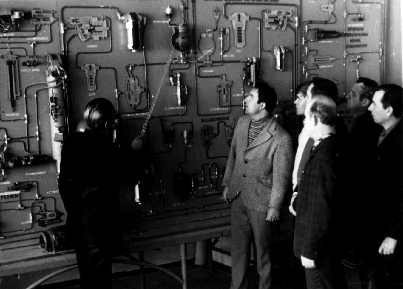 Сотрудники 31 Завода авиационного технологического оборудования (Новочеркасск) изучают макет гидравлической системы самолета